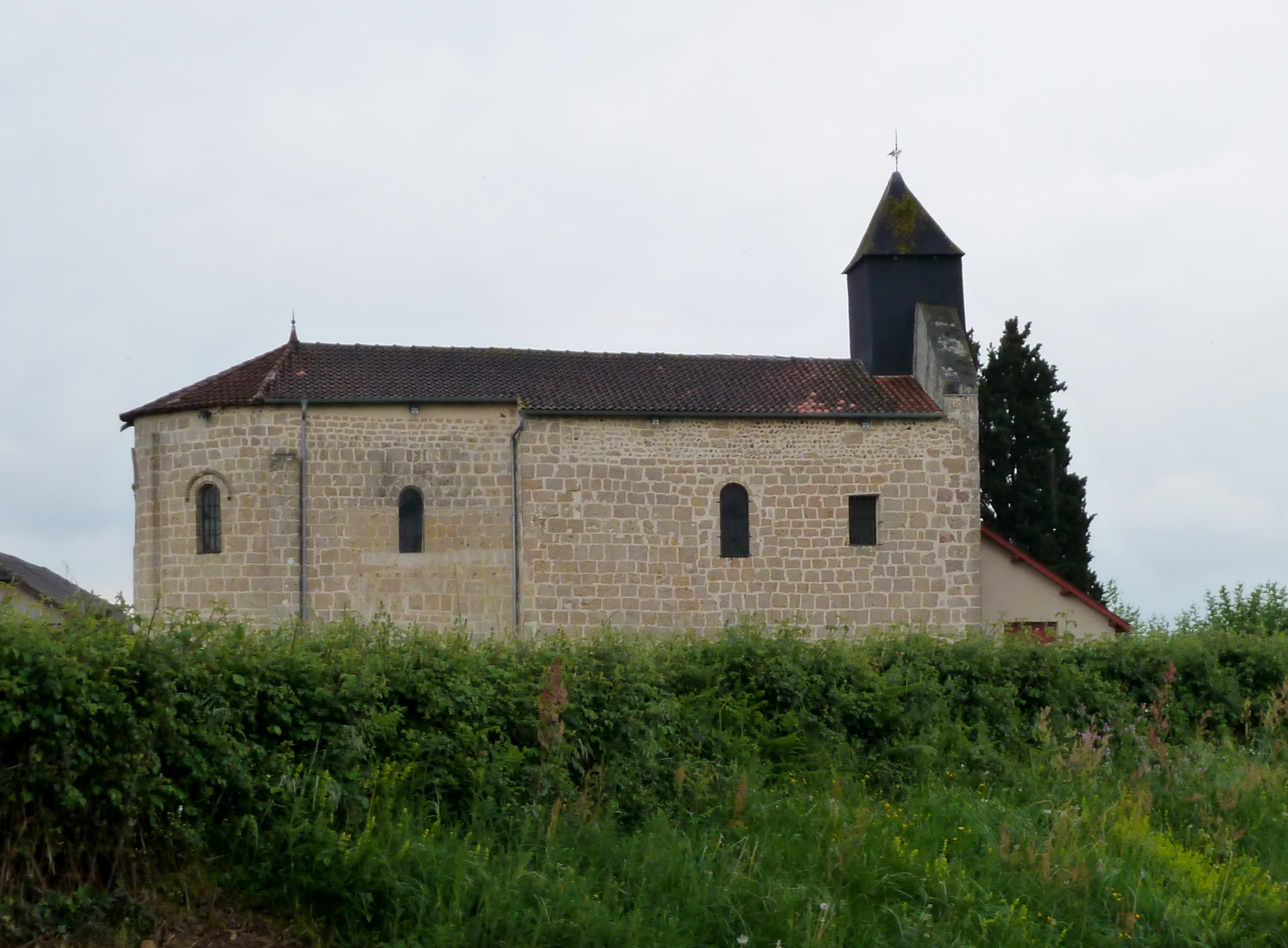 Église d'Escurès